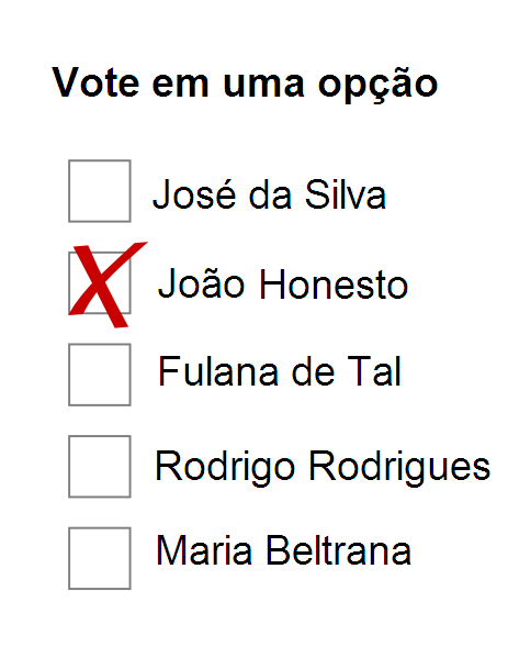 Exemplo de cÃ©dula de votaÃ§Ã£o por pluralidade Fonte: Adaptado de pt::en:Image:Plurality ballot.svg